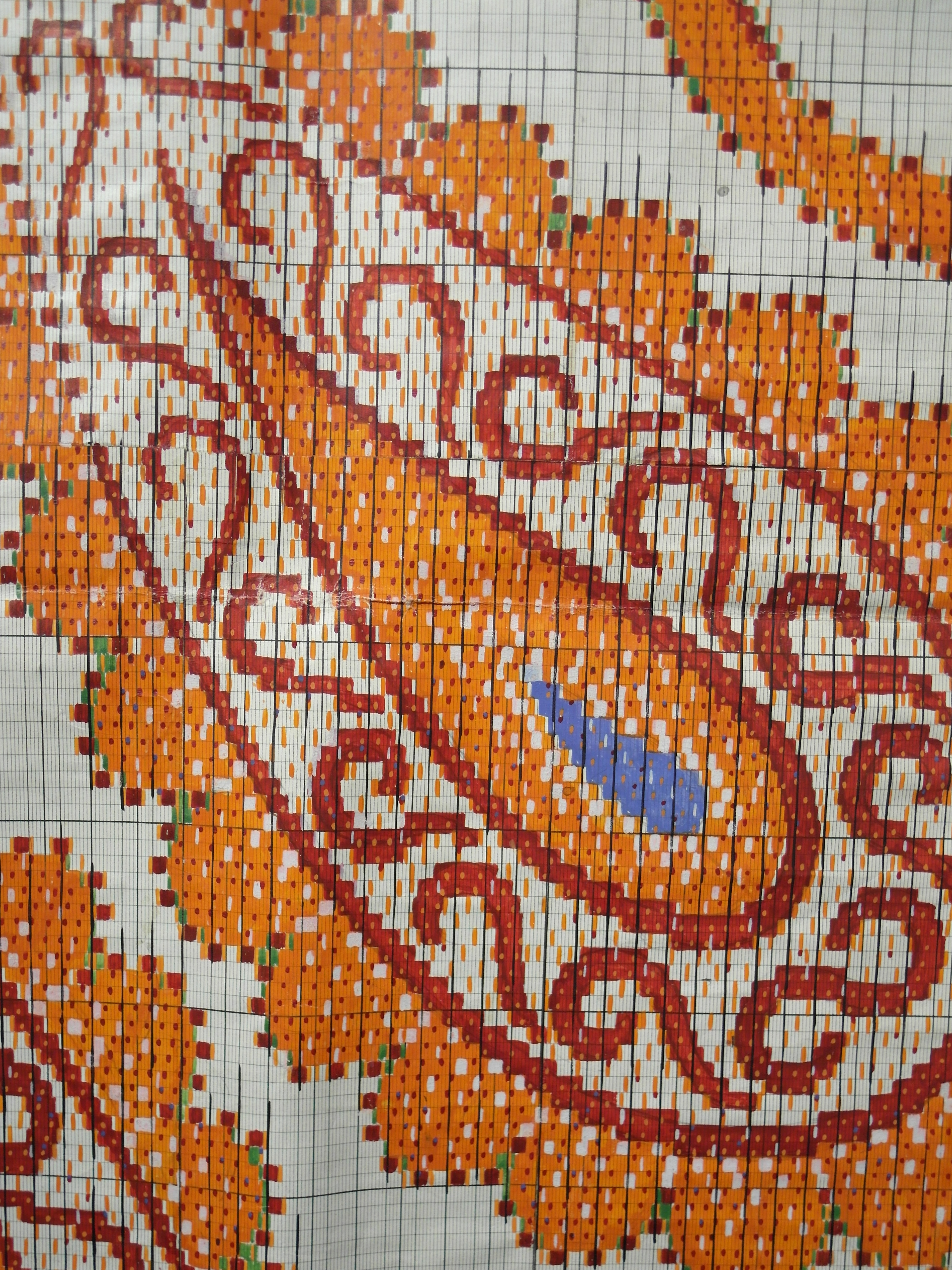 Stehli Seiden, Obfelden ZH, Schweiz